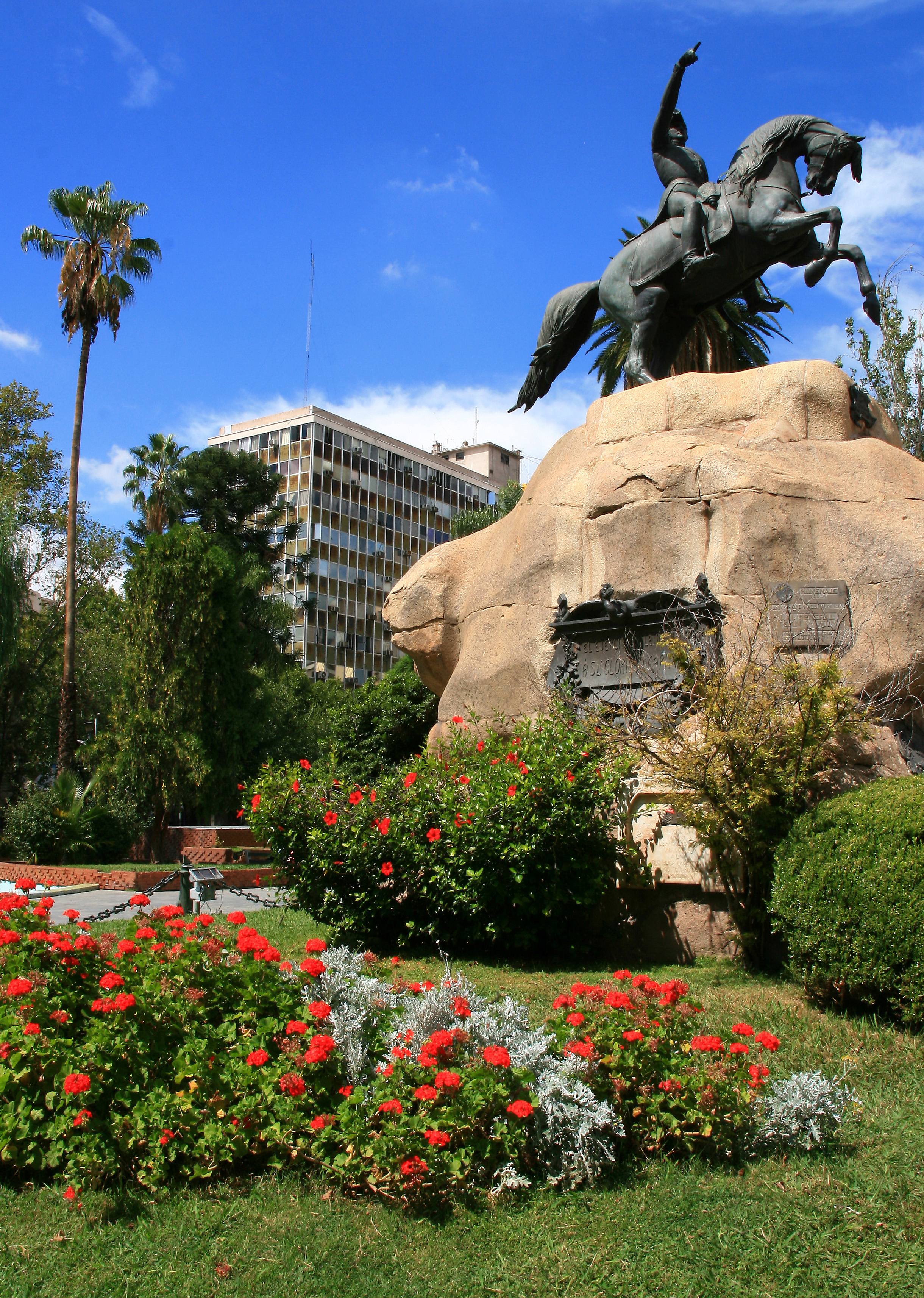 Plaza San Martín, Mendoza, Argentina.